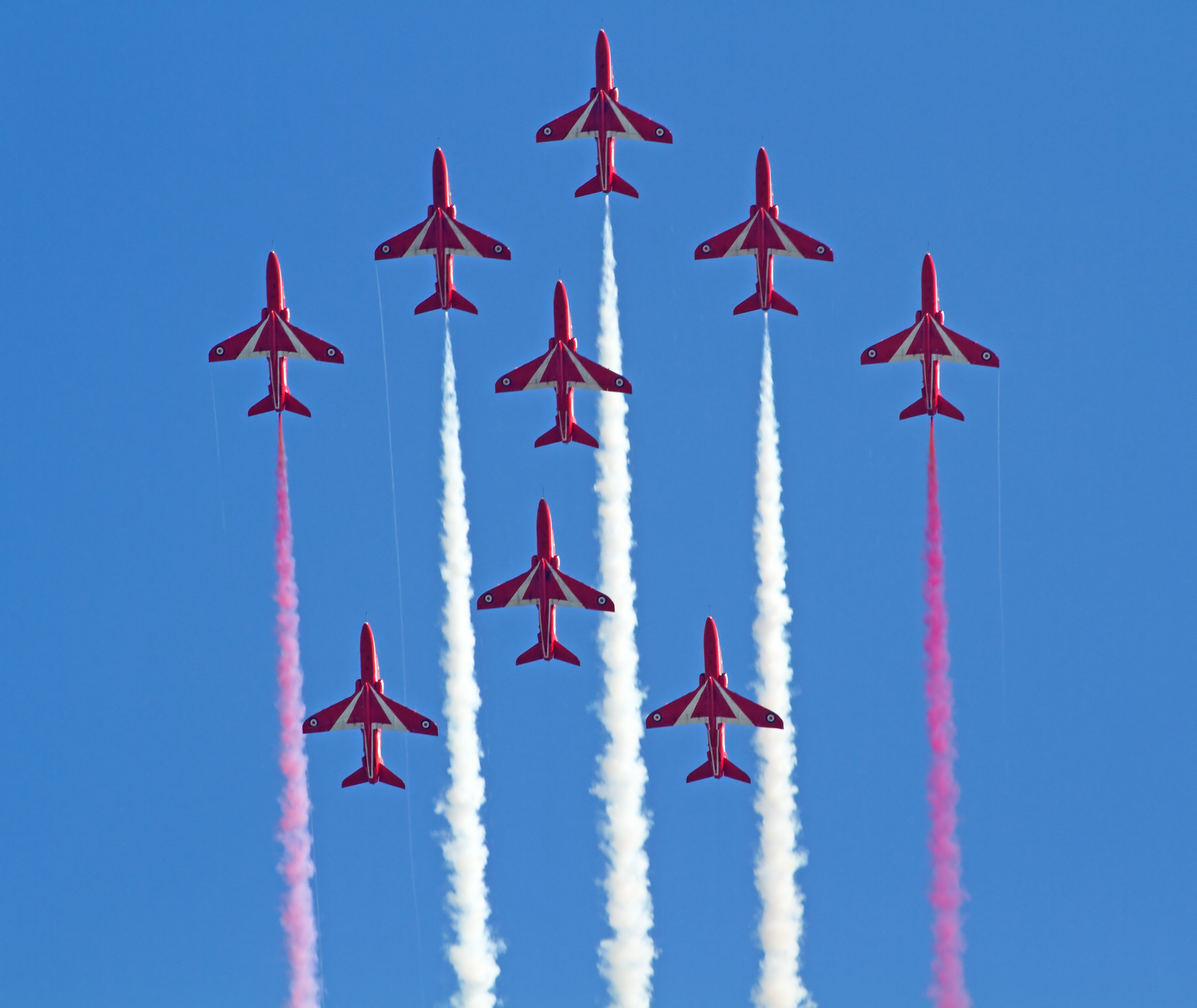 Los Red Arrows en una exhibición aérea en Shifnal, Reino Unido, el 9 de junio de 2013.